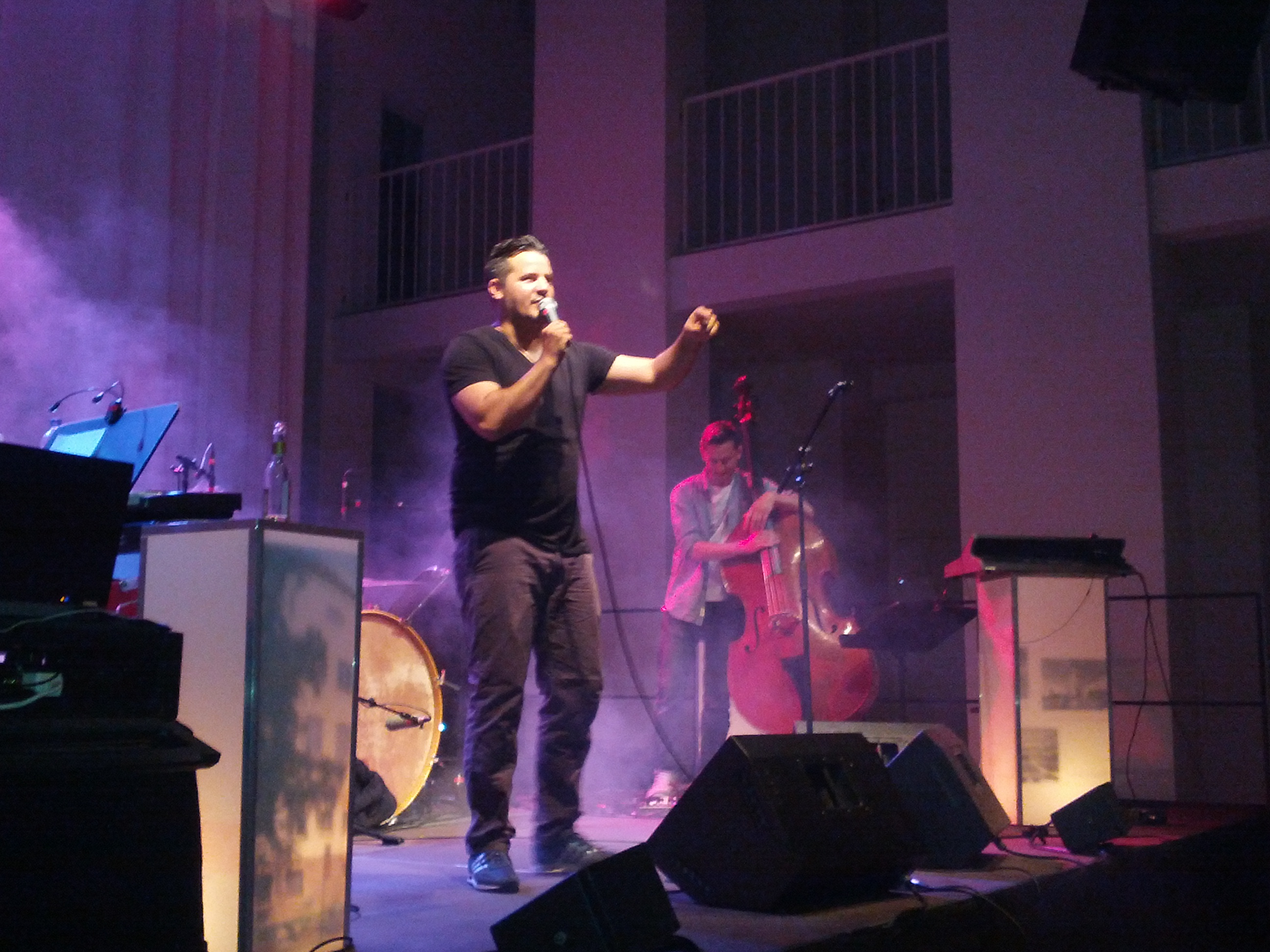 MC Rene bei einem Aufritt im Festspielhaus Hellerau in Dresden